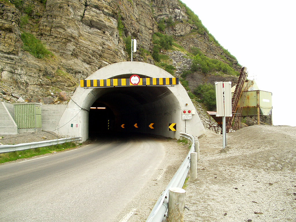 Inngangspartiet på sørsiden av Skarvbergtunnelen.